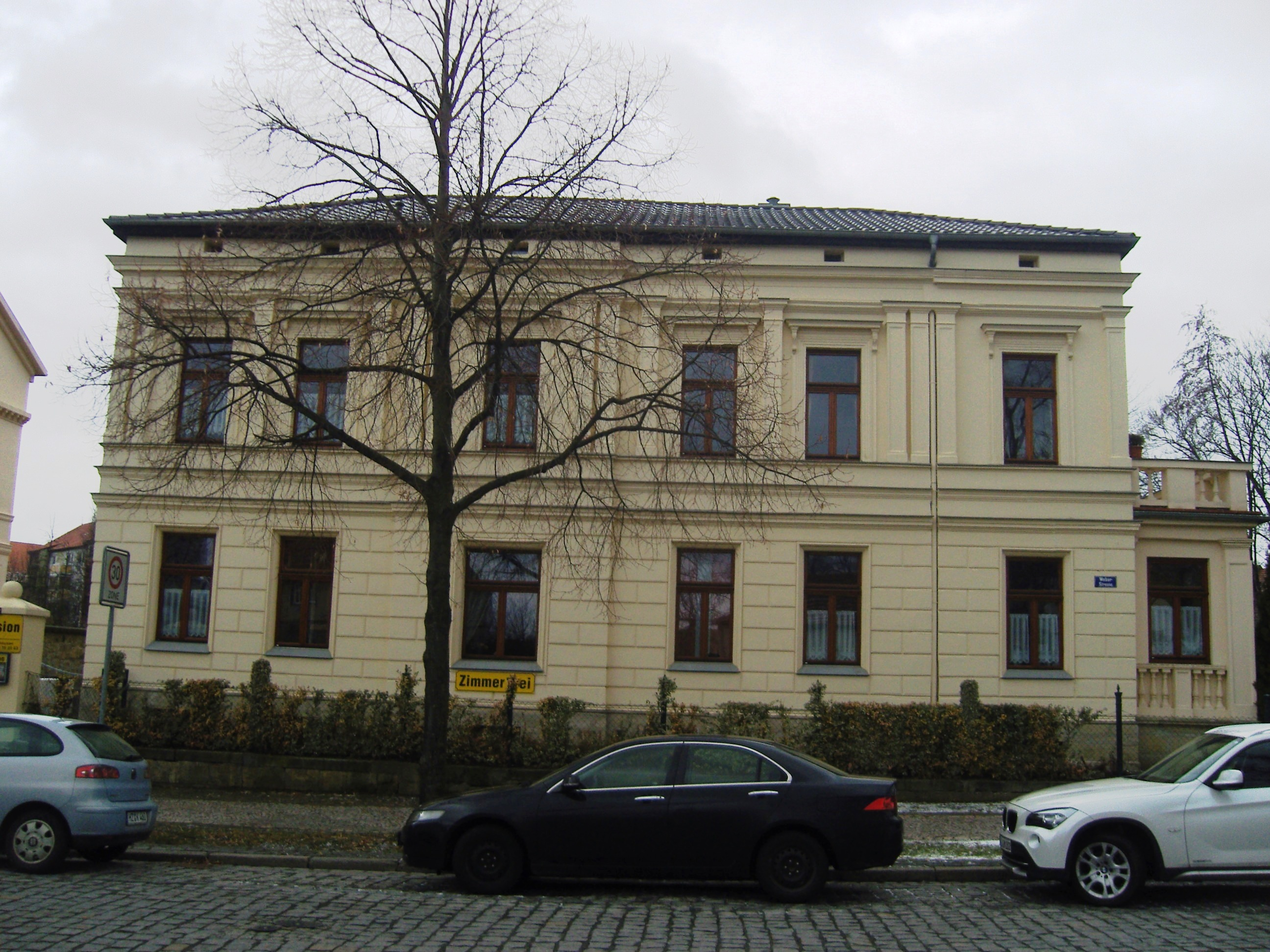 Denkmalgeschützte Villa Weberstraße 27 in Quedlinburg